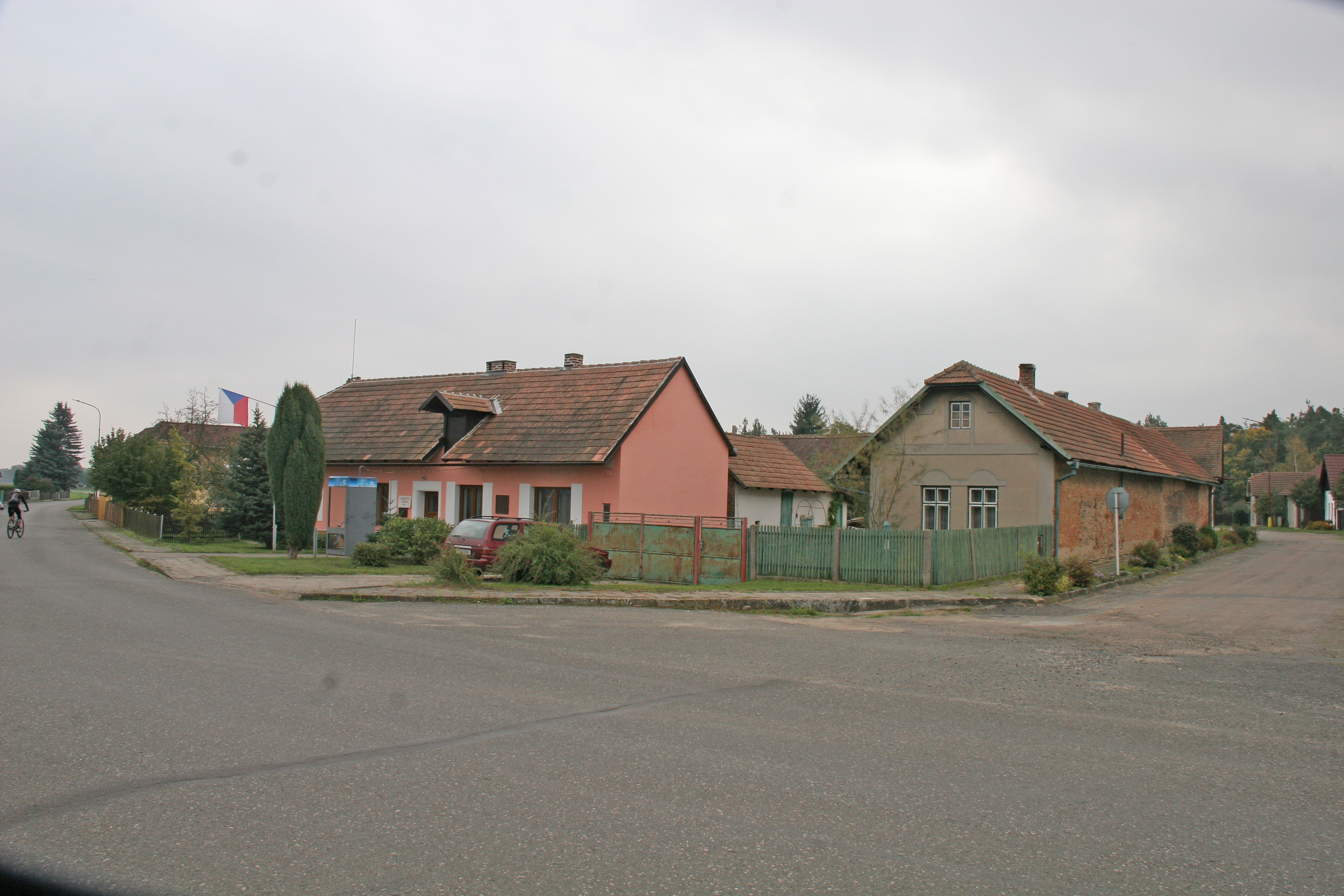 Tetov obecní úřad